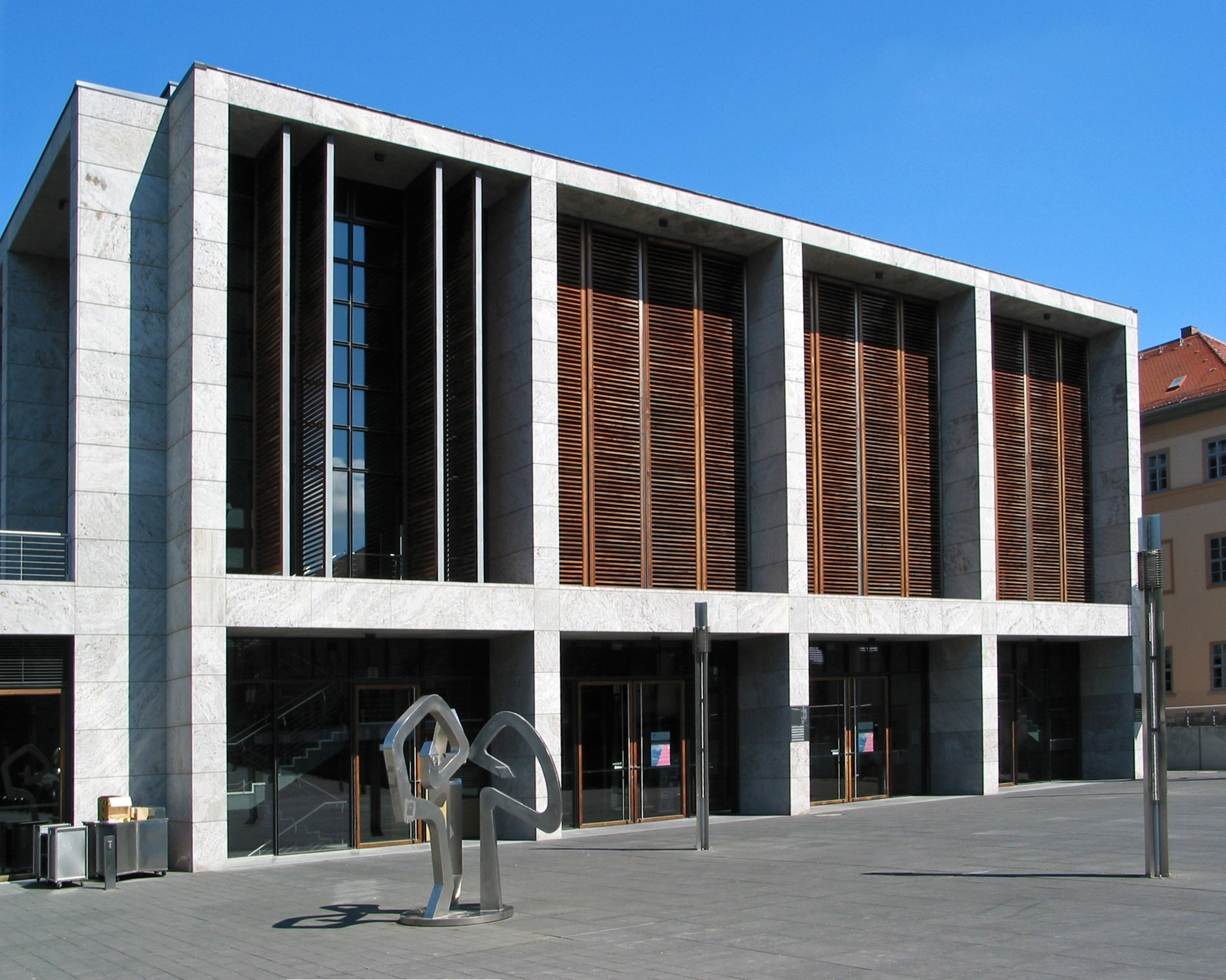 Das "congress centrum neue weimarhalle" - Südansicht vom UNESCO-Platz. 1997 vom Büro Gerkan, Marg & Partner entworfen. 1999 eröffnet.